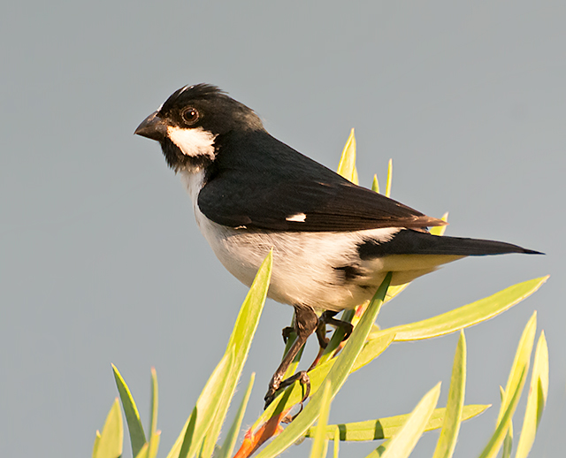 Aguas de Santa Bárbara-SP - Brasil